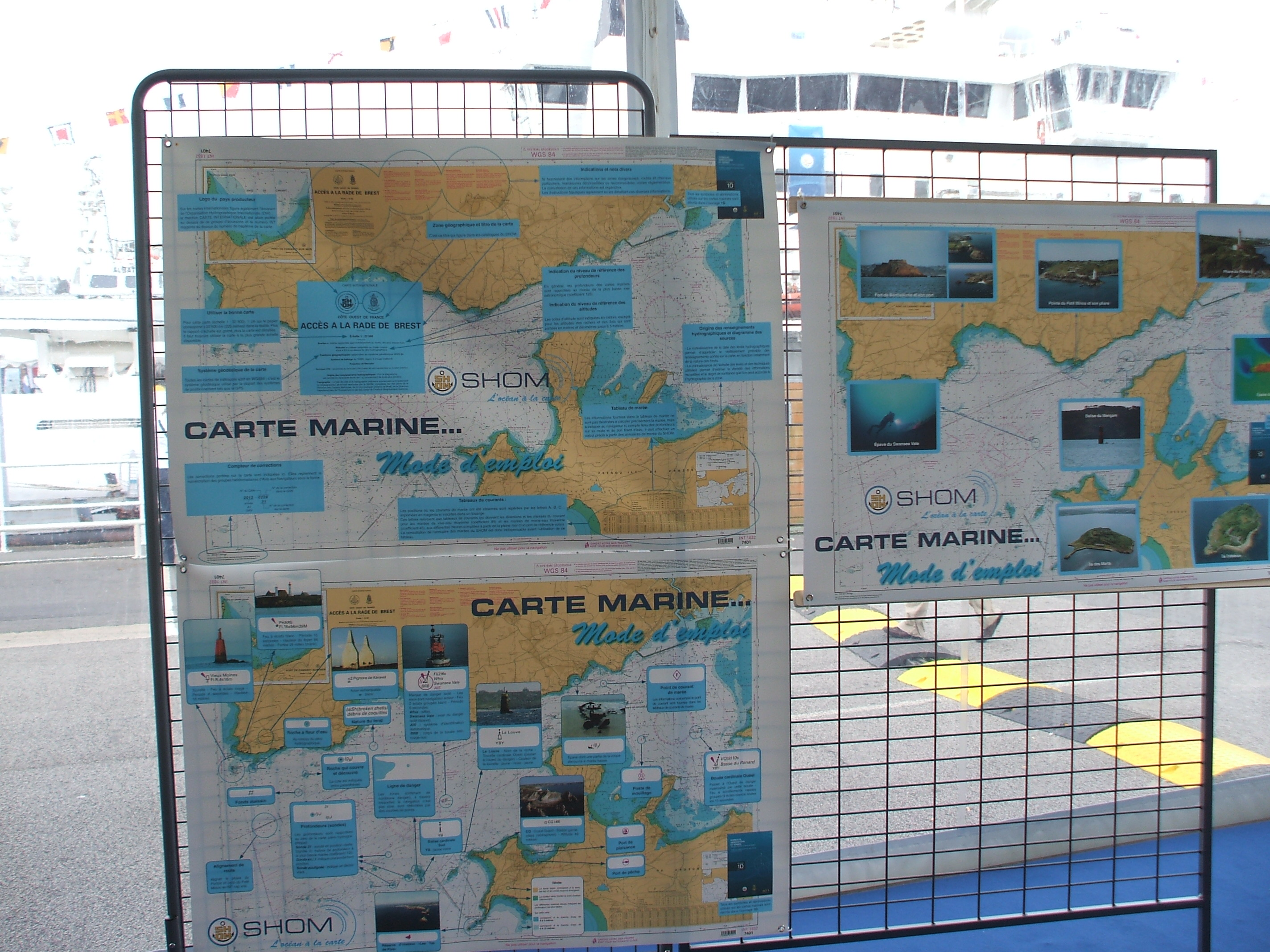 exposition du SHOM